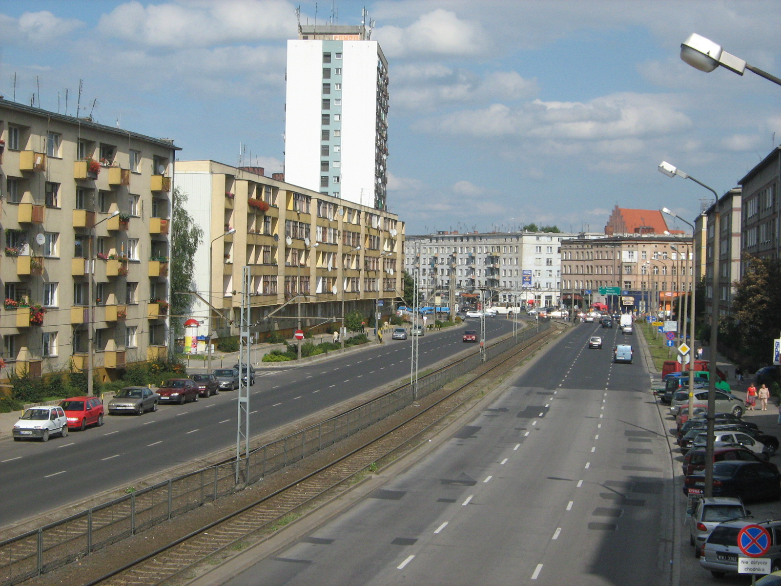 Wrocław, ul. Grabiszyńska.